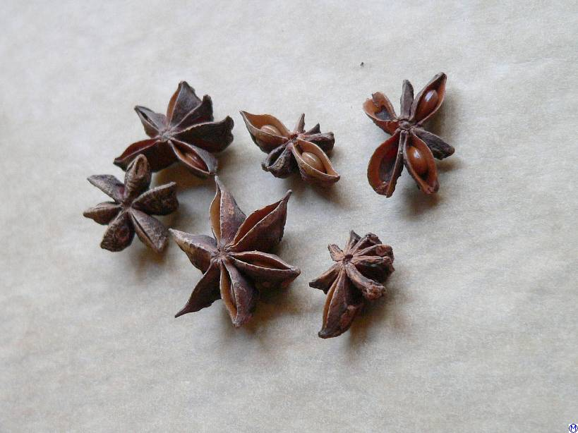 Illicium verum